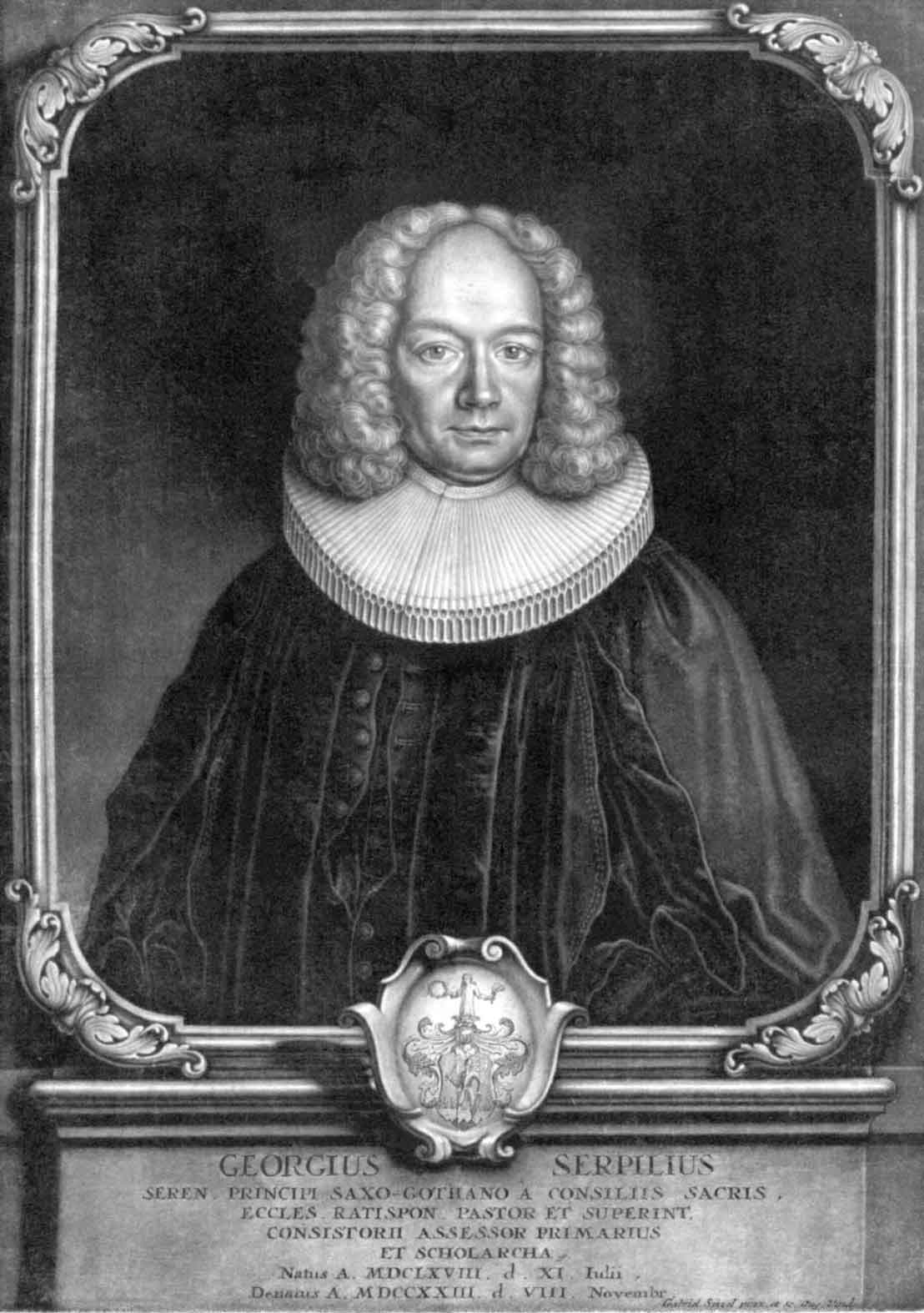 Georg Serpilius (auch: Theophilus Sincerus; 1668-1728), ungarischer evangelischer Theologe und Lieddichter